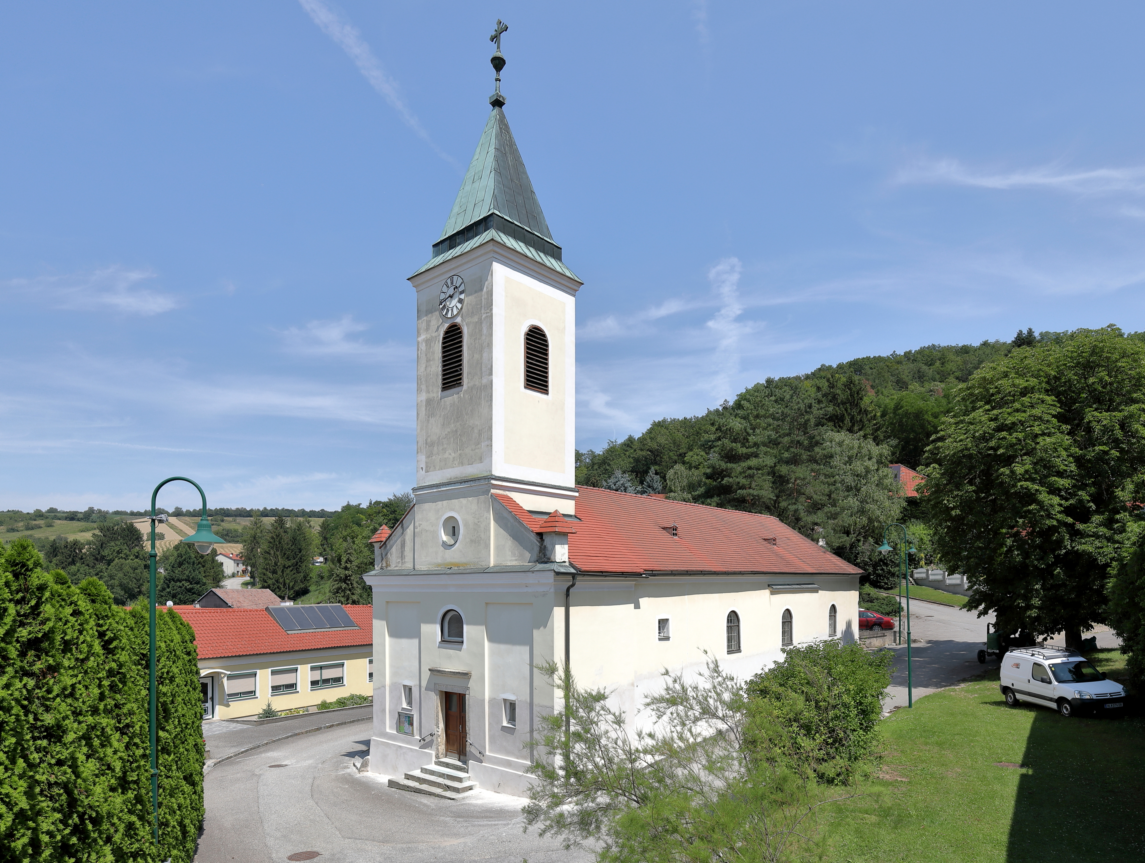 Südwestansicht der röm.-kath. Pfarrkirche heiliger Ägydius in Bergau, ein Ortsteil der niederösterreichischen Marktgemeinde Göllersdorf.Eine schlichte Saalkirche mit klassizistischer Westturmfassade. Im Zuge der Josephinischen Kirchenreform wurde sie 1784 zur Pfarrkirche geweiht.